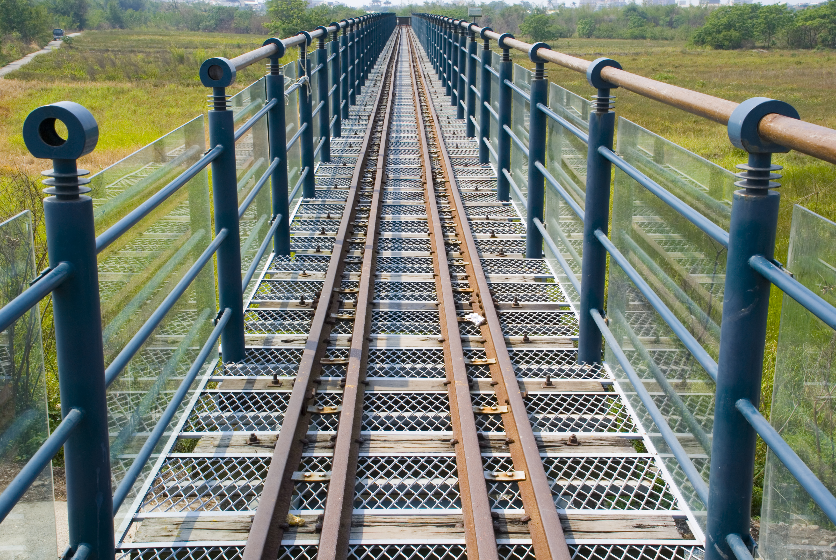 台糖北港溪鐵橋，在台糖公司的正式稱呼為「北港溪11號橋」，自明治42年(1909)興建以來，是連結了北港、新港兩地重要的交通要道，不僅對雲、嘉一帶的糖產業發展作出貢獻，也和北港溪兩岸居民的生活有著不可分割的歷史情感。 今日的鐵橋風貌雖然歷經改建與擴建，已非原始木造橋梁的舊觀，然而，鐵橋所承載的歷史意義是十分鮮明，永不磨滅的歷史記憶。